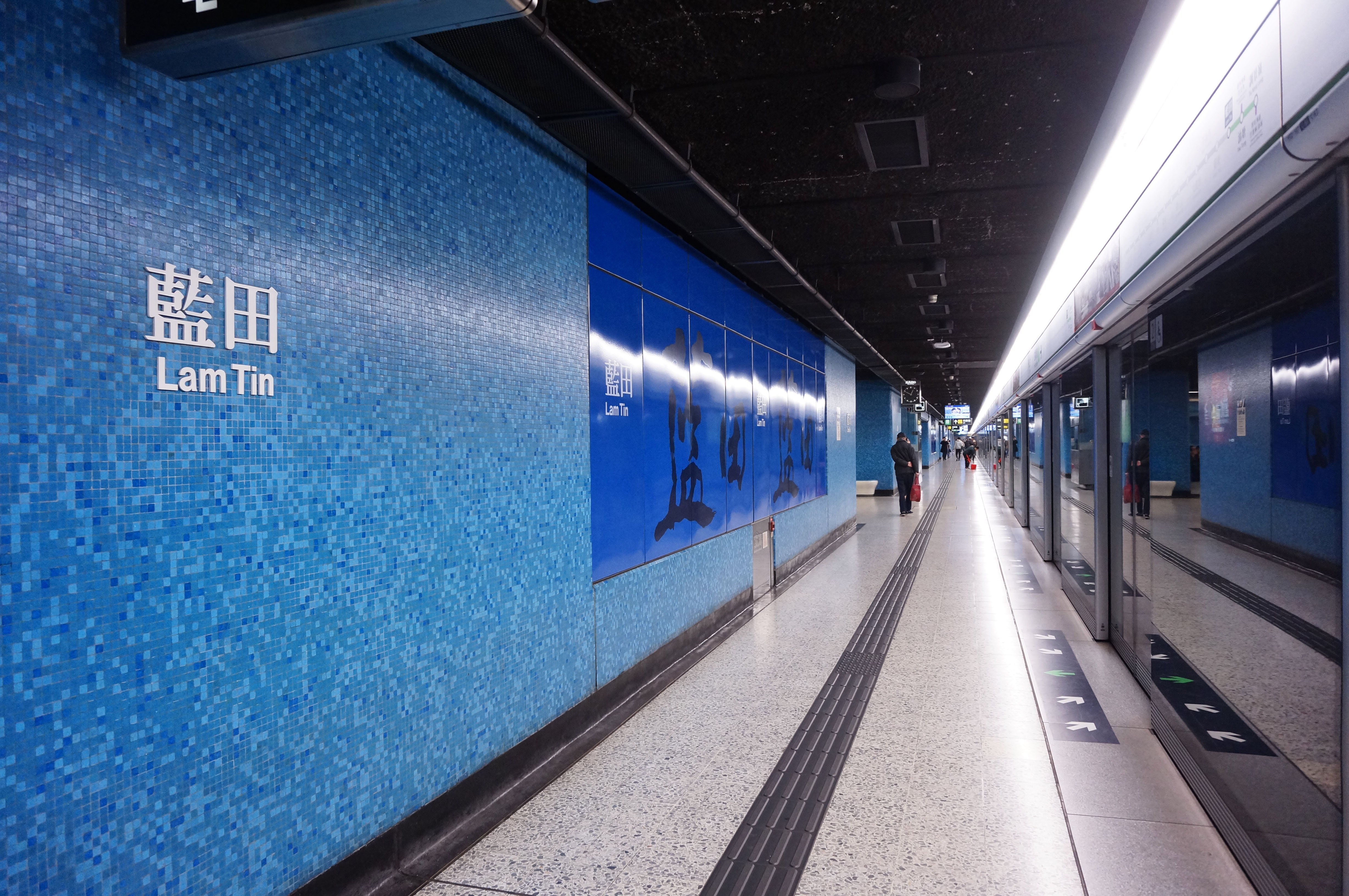 港鐵藍田站月台